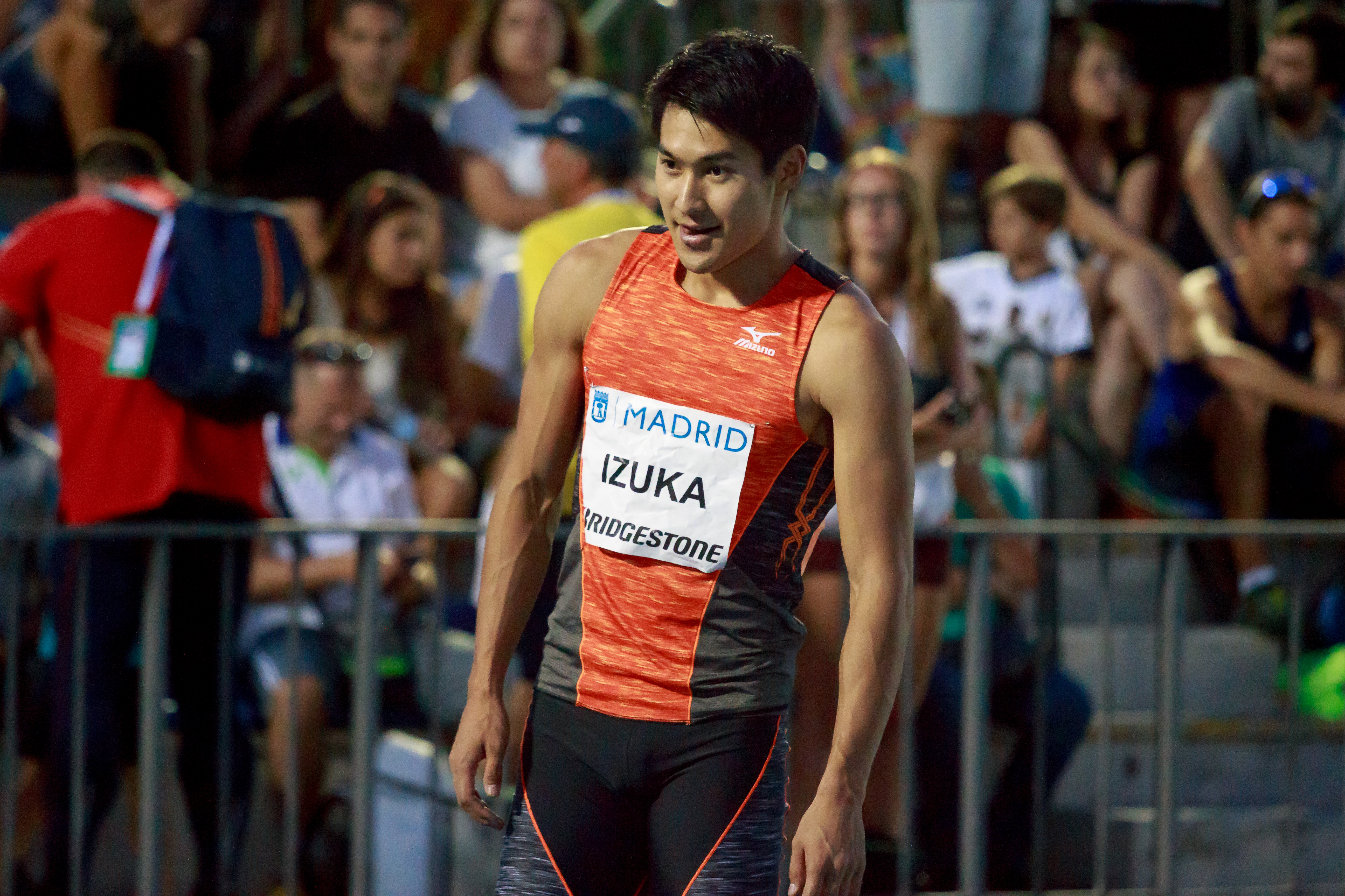 Shota Izuka (JPN). 200m. IAAF World Challenge. Meeting Madrid 2017. Moratalaz, Madrid.